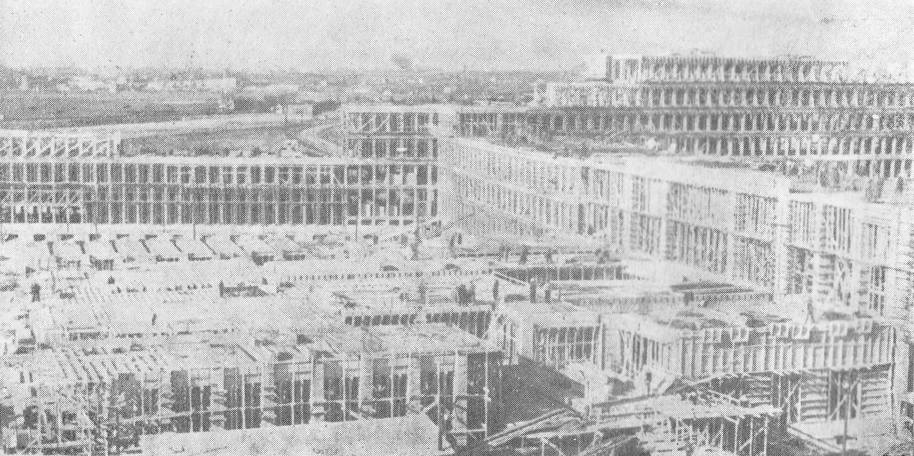 Predsedništvo Vlade - druga polovina 1948.